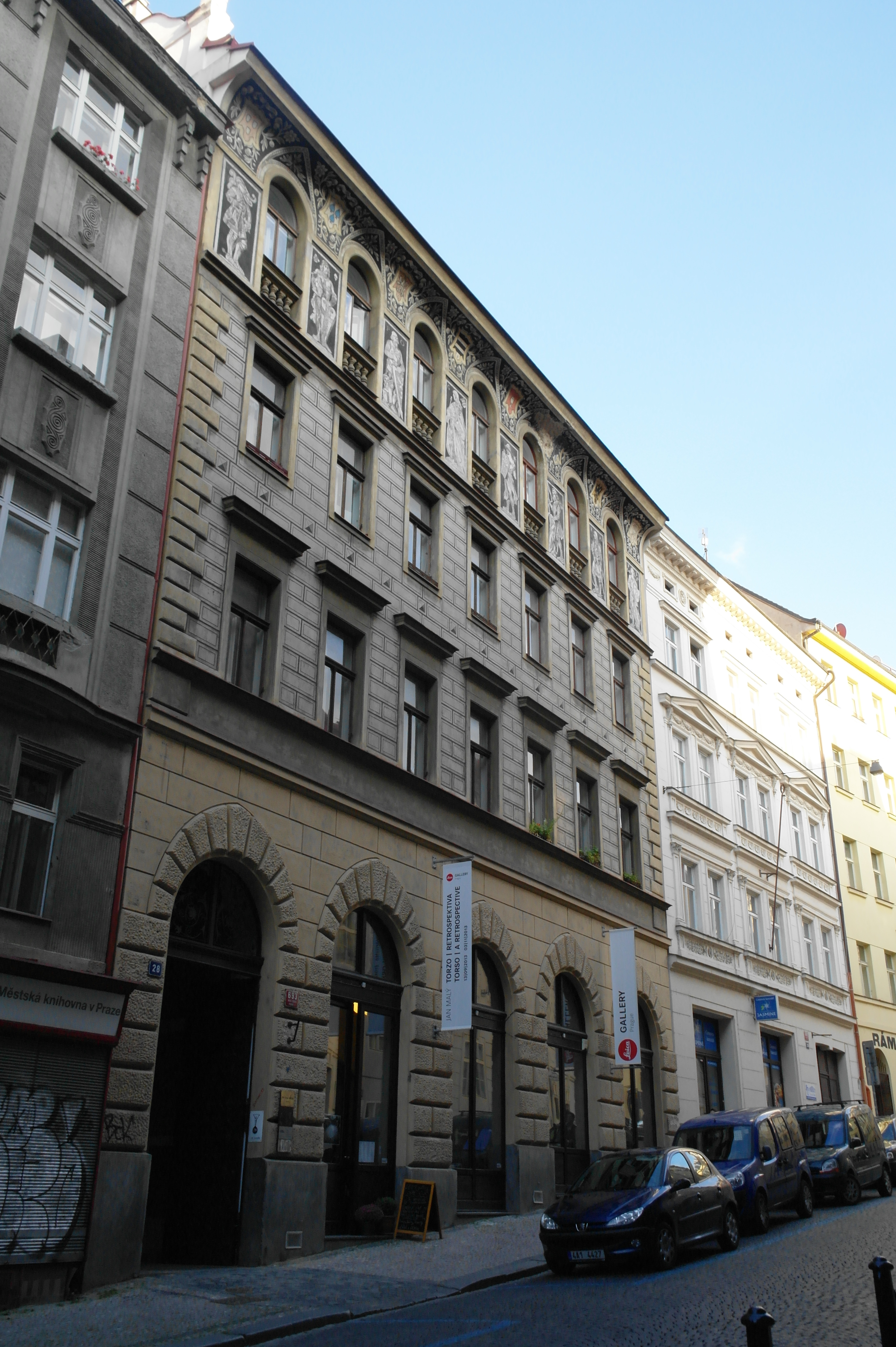 Měšťanský dům U rytířů, č.p. 693, Nové Město; Školská 23, Praha 1; v budově sídlí mj. Leica Gallery Prague